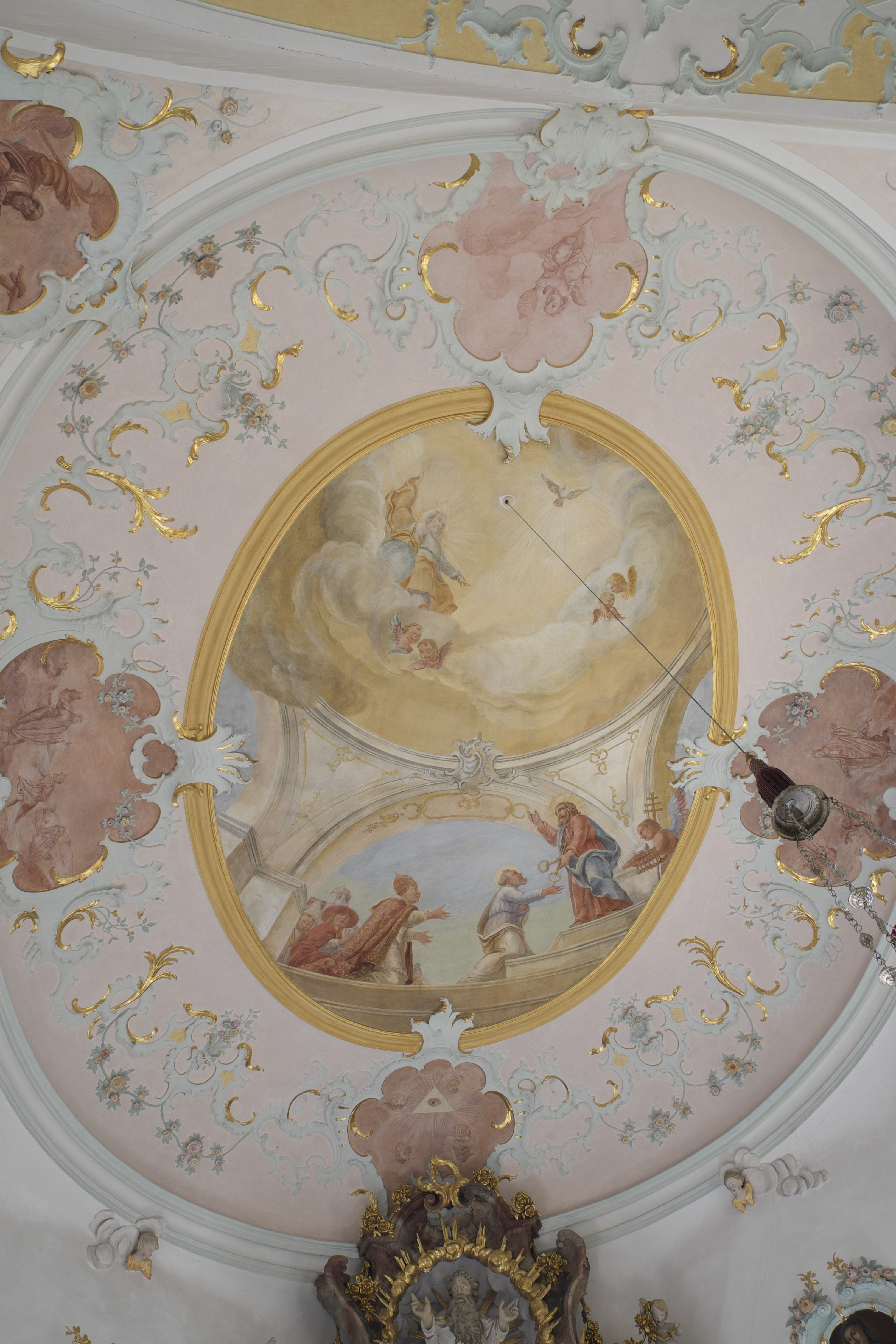 Katholische Pfarrkirche St. Petrus und Paulus in Petzenhausen, einem Ortsteil von Weil (Oberbayern) im Landkreis Landsberg am Lech (Bayern/Deutschland), Chorfresko eines unbekannten Künstlers, um 1760; Darstellung: Schlüsselübergabe an Petrus